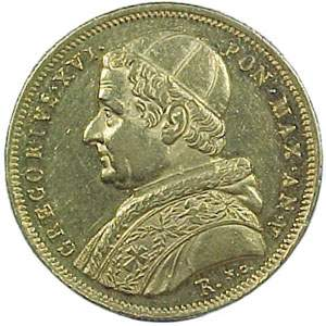 Монета с профилем Григория XVI